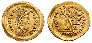 Tremisse do imperador Marciano